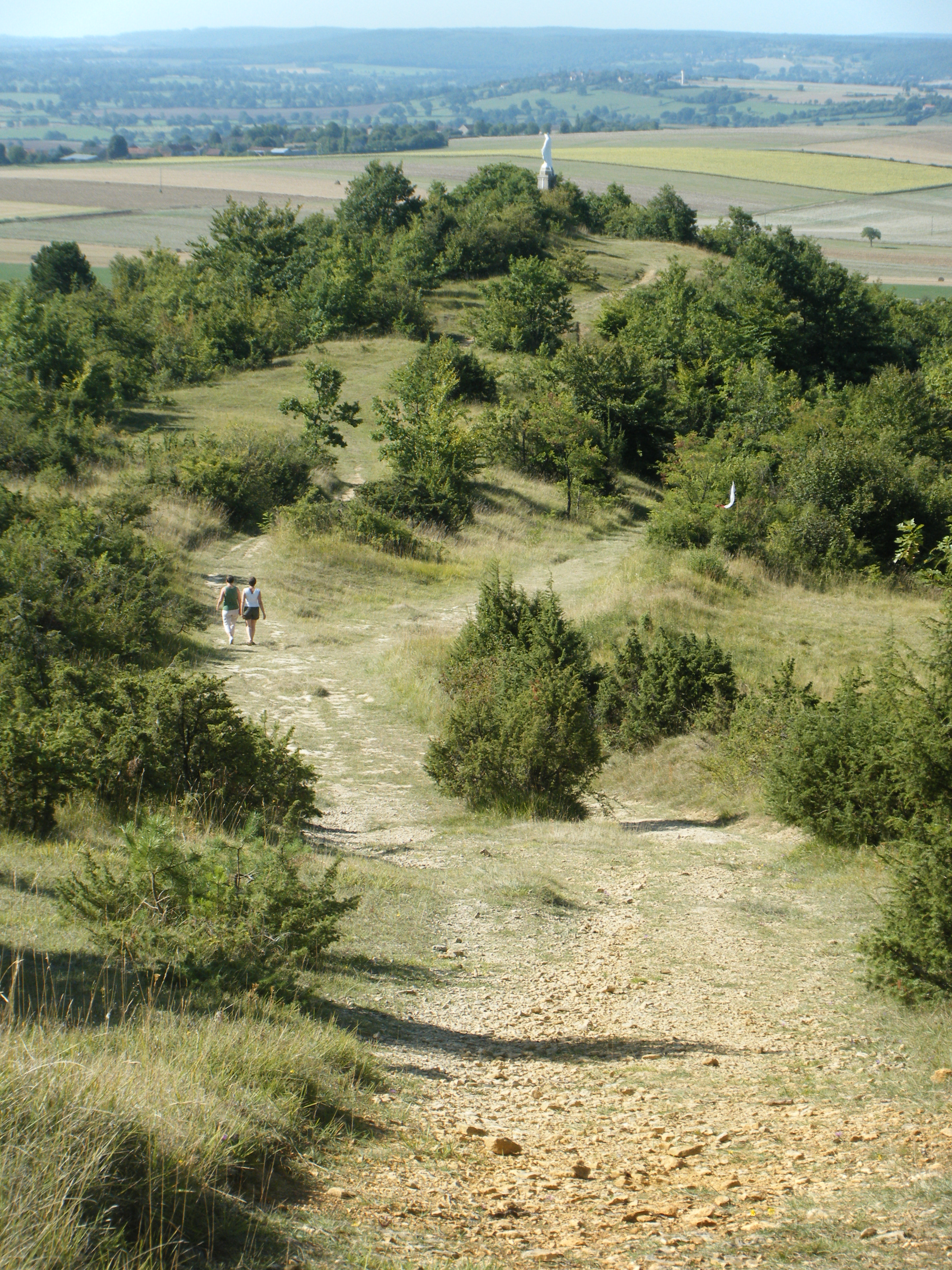 L'éperon du Montgué à Asnan en 2009. Ancien site néolithique.